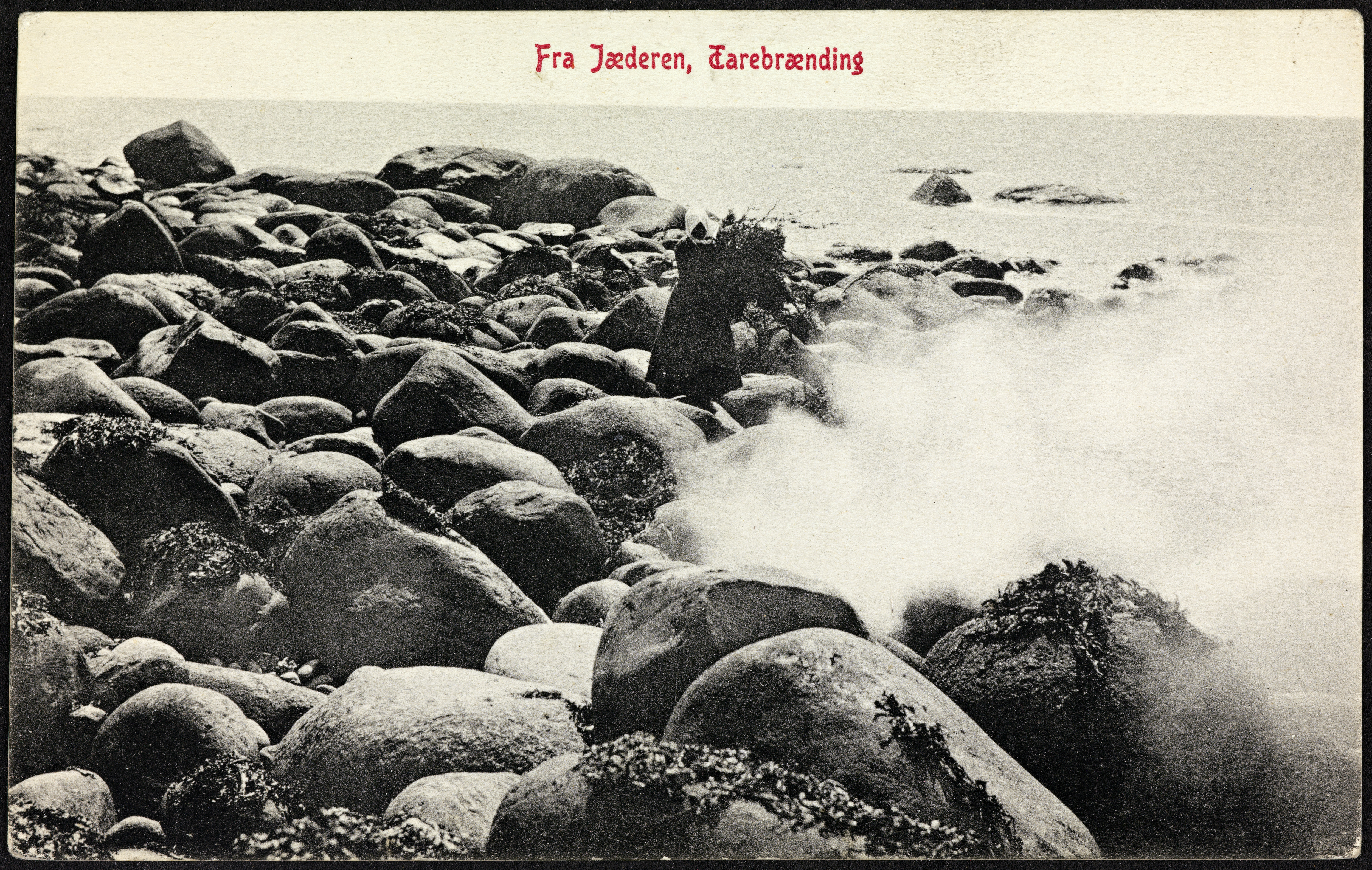 Beskrivelse / Description: Burning of kelp. Dato / Date: ca. 1910 Sted / Place: Rogaland, Jæren Fotograf / Photographer: ukjent / unknown Utgiver / Publisher: Narvesen Kioskkompagni (N. K.) Digital kopi av original / Digital copy of original: s/h postkort, lystrykk Eier / Owner Institution: Nasjonalbiblioteket / National Library of Norway Lenke / Link: Bildesignatur / Image Number: blds_06894